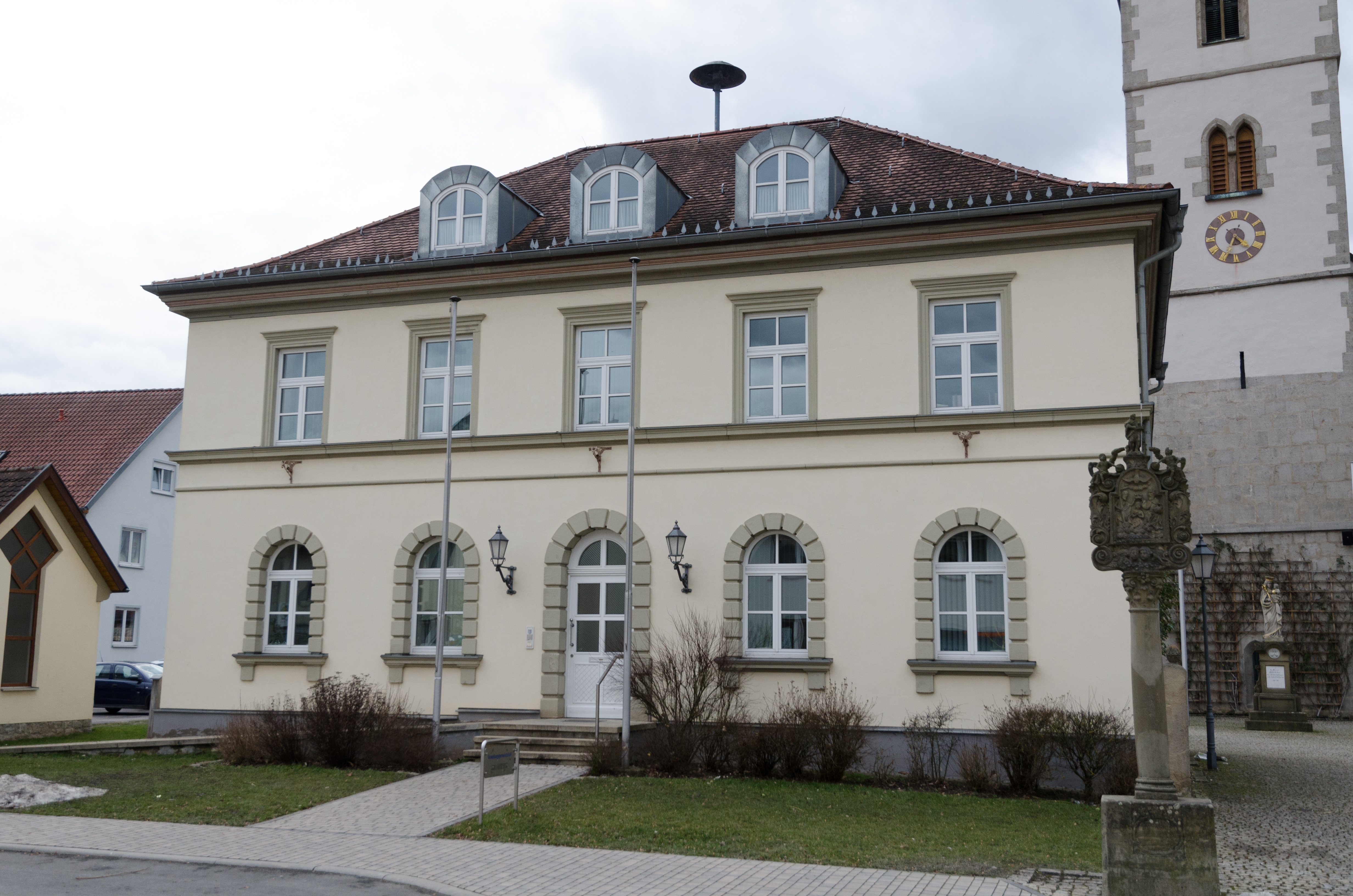 Heustreu, Wetterstraße 4: ehemaliges Schulhaus, jetzt Rathaus und Sitz auch der Verwaltungsgemeinschaft